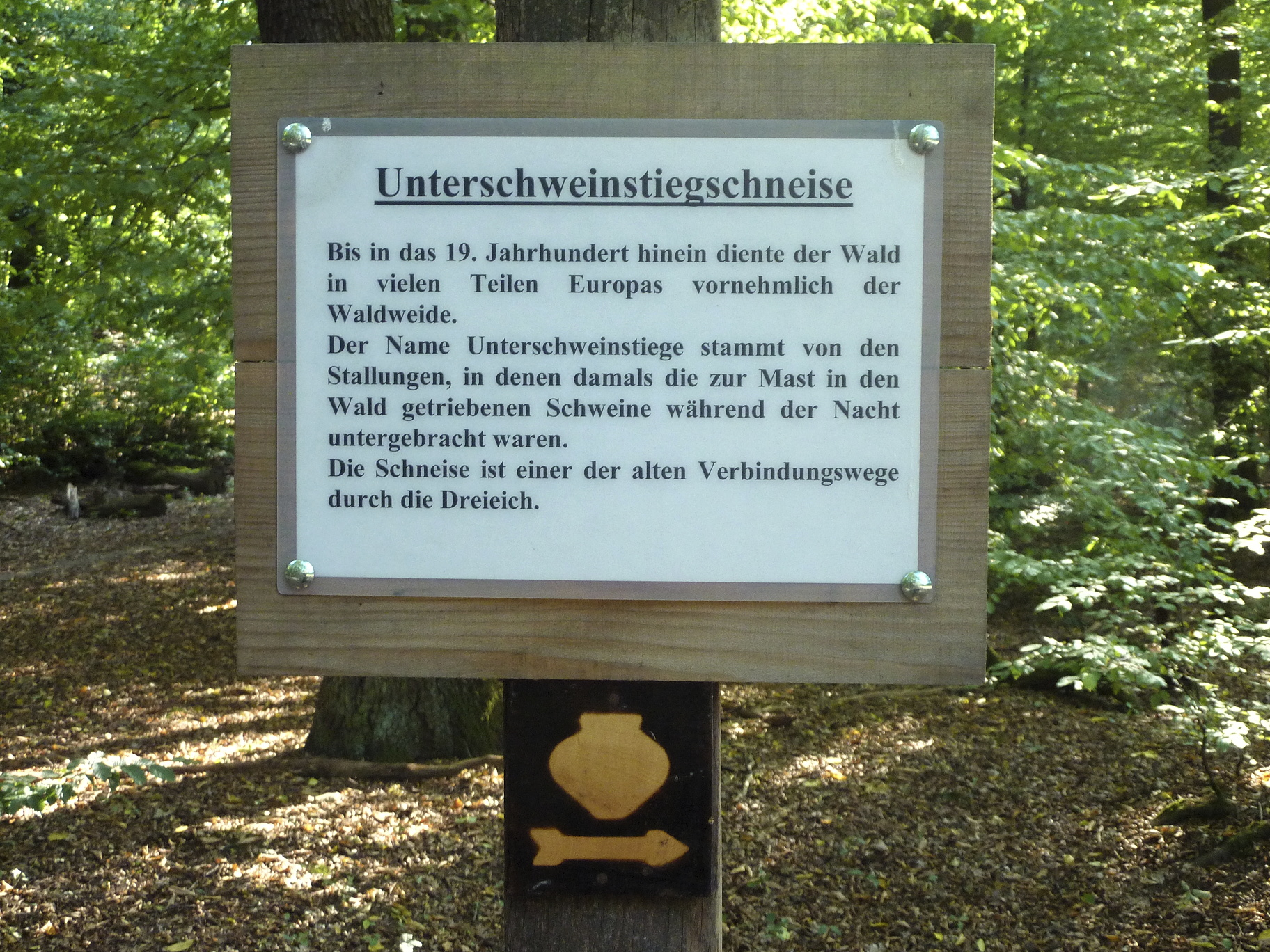 Frankfurt am Main, Stadtwald: Entlang der Kelsterbacher Terrasse, Abbruchkante des Main-Urstromtals aus dem Pliozän, verläuft an deren Oberkante die Grenzschneise. Diese ist ein Abschnitt einer Altstraße zwischen Mainz und Frankfurt. Das Foto zeigt eine Infotafel zu der die Grenzschneise kreuzenden Unterschweinstiegschneise